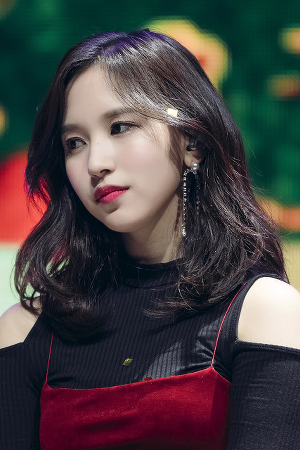 171030 트와이스 LIKEY 쇼케이스 미나 (1)